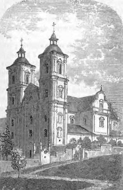 Bazylika w Starej Wsi (przed 1887).